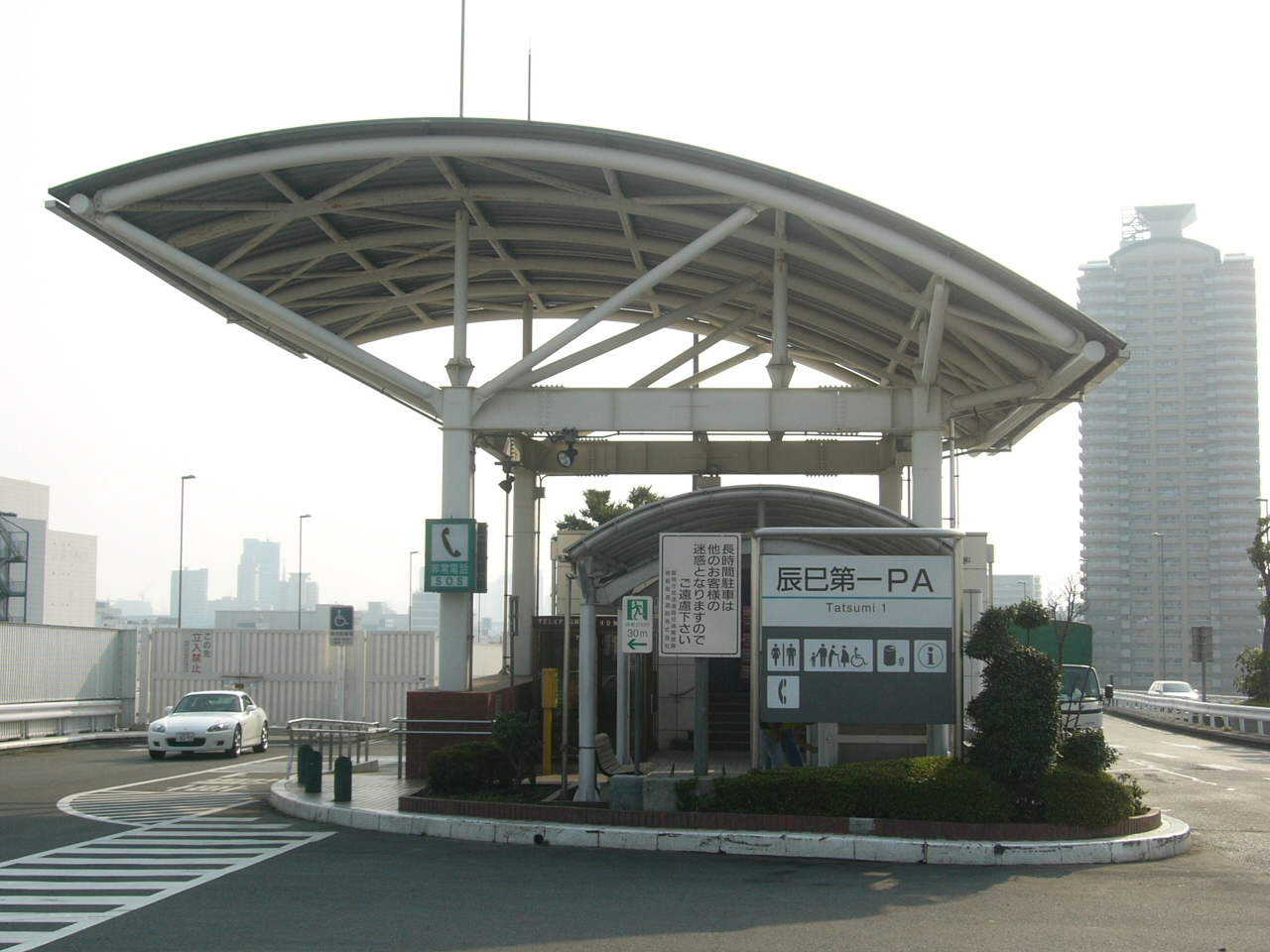 Tatsumi 1 Parking Area